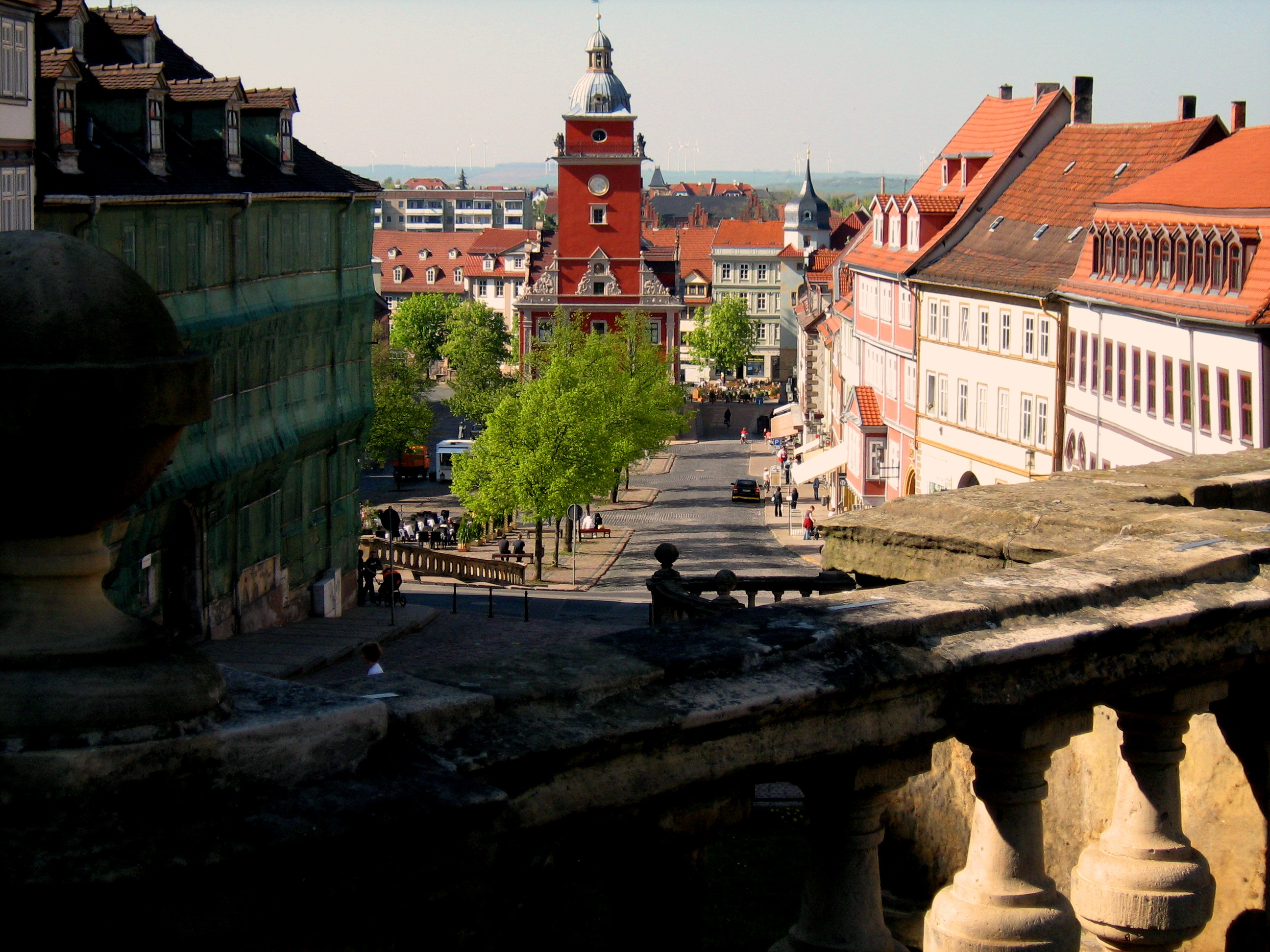 Rathaus, freistehender Renaissancebau, 1665 Umbau eines Kaufhauses zum Rathaus durch Schloßbaumeister Andreas Rudolff, 19.Jh. grundlegende Umgestaltung, Blick von 3-stufiger Fassung des Leinakanals, 1895